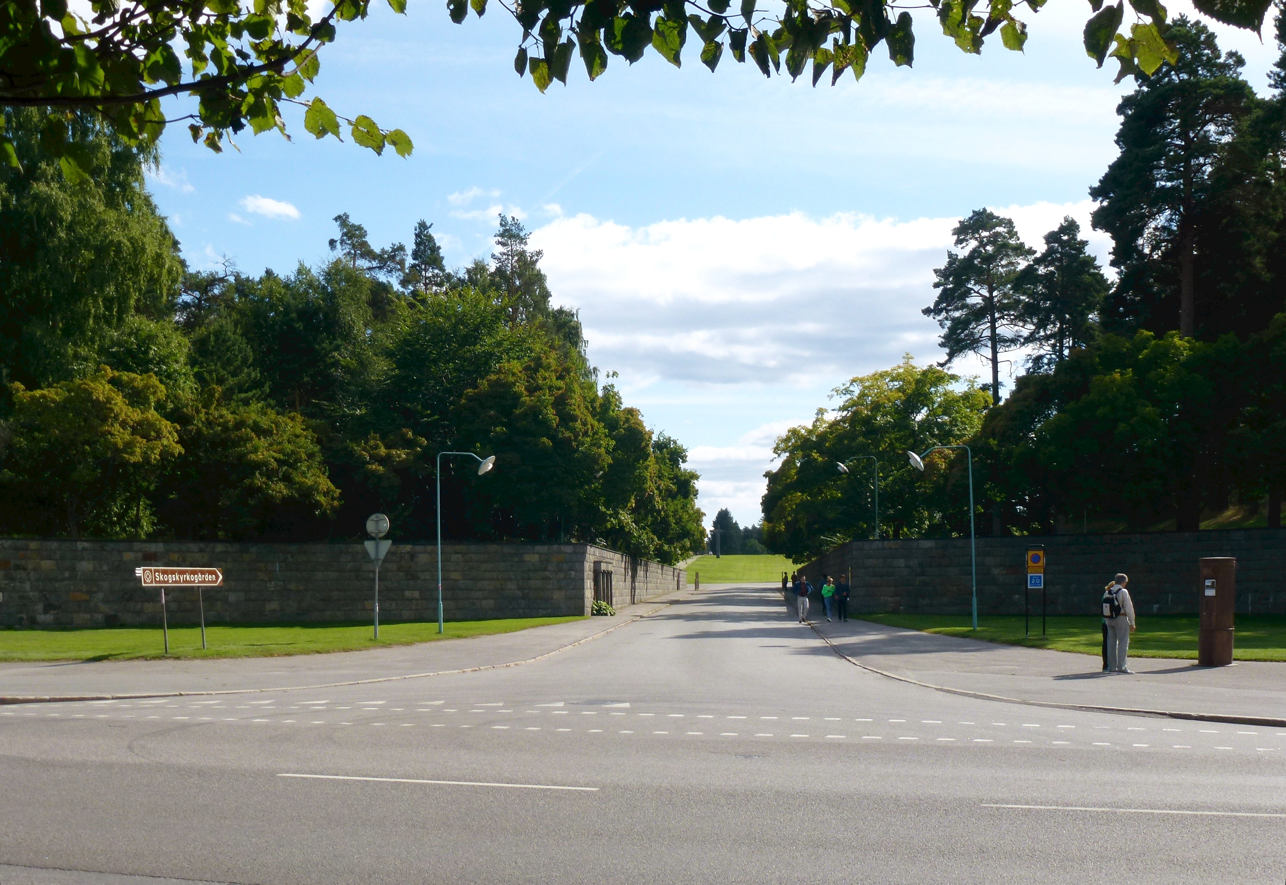 Skogskyrkogården, huvudentré från Sockenvägen